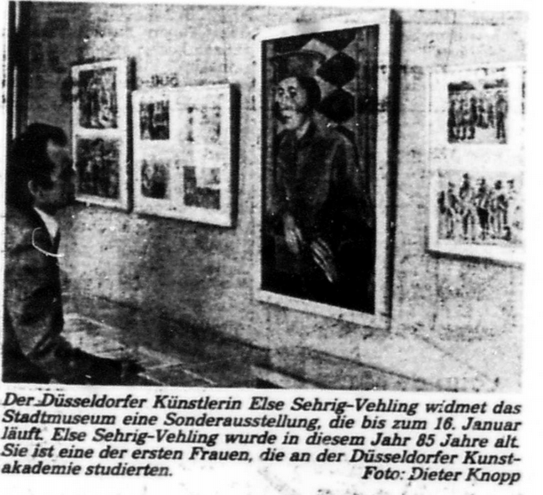 Sonderausstellung im Düsseldorfer Stadtmuseum 1983